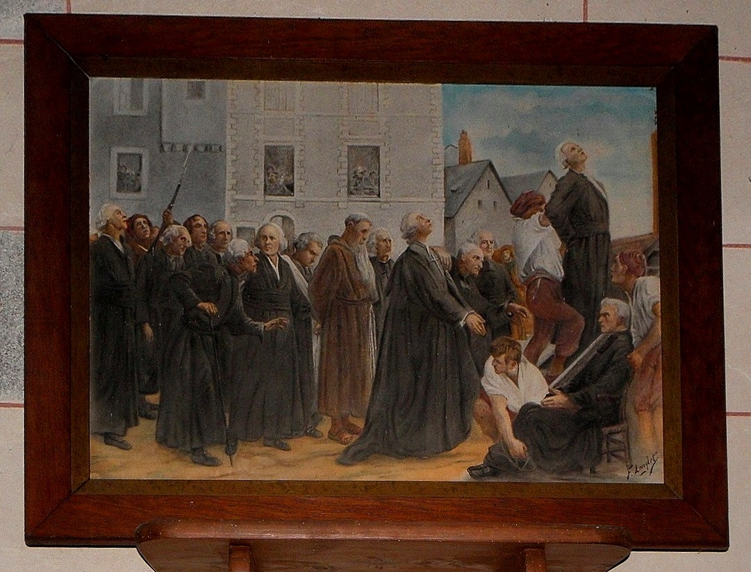 Intérieur de l'église Saint-Ouen de Saint-Ouën-des-Toits (53). Tableau des 14 prêtres martyrs de la Révolution, guillotinés le 21 janvier 1794 à Laval.